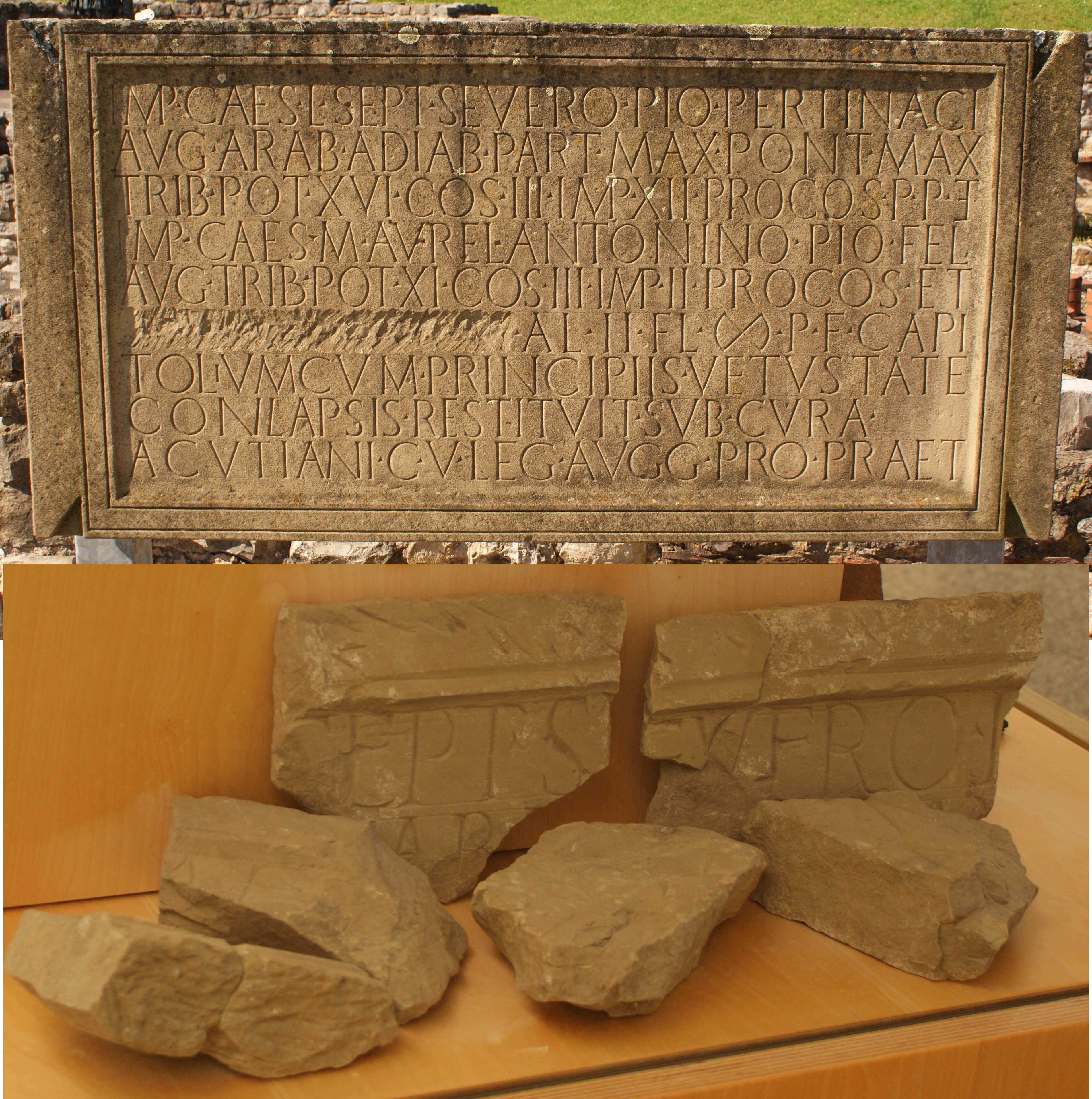 Limesmuseum Aalen, Bauinschrift Septimius Severus (AE 1989, 00580 = AE 1995, +00045 = AE 2001, +01566), oben Nachbildung in der Außenanlage, unten Bruchstücke im Museum. Mit freundl. Genehmigung des Museums.